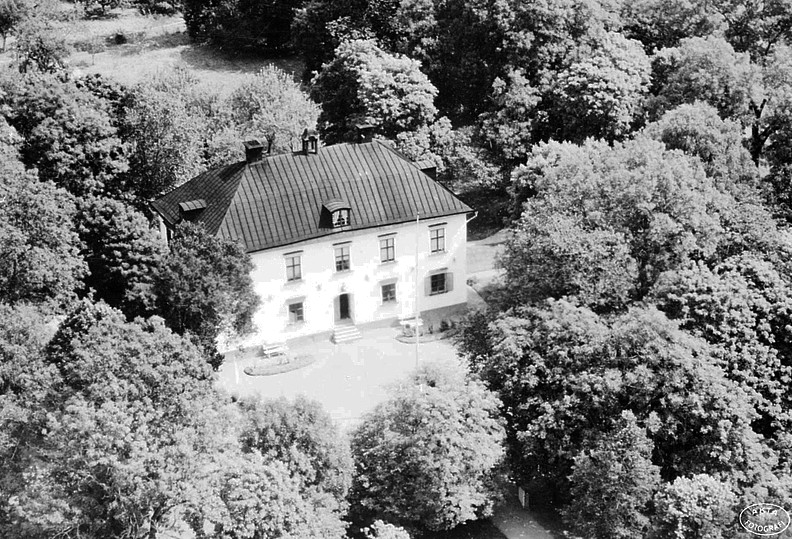 Flygfoto över Långtora gård (Enköpings kommun)